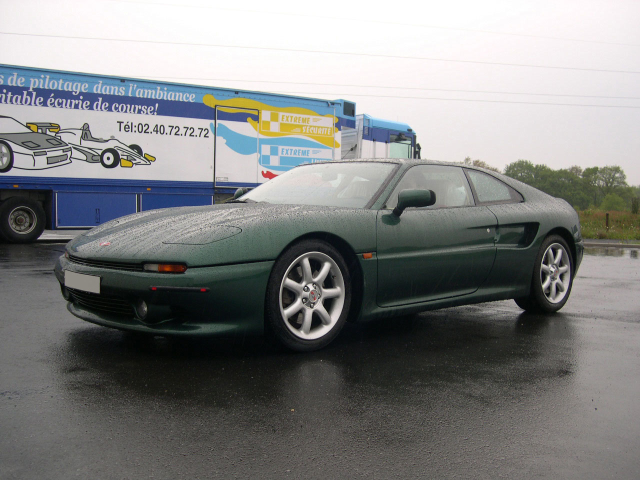 Venturi 300 Atlantique Bi-Turbo French sport car